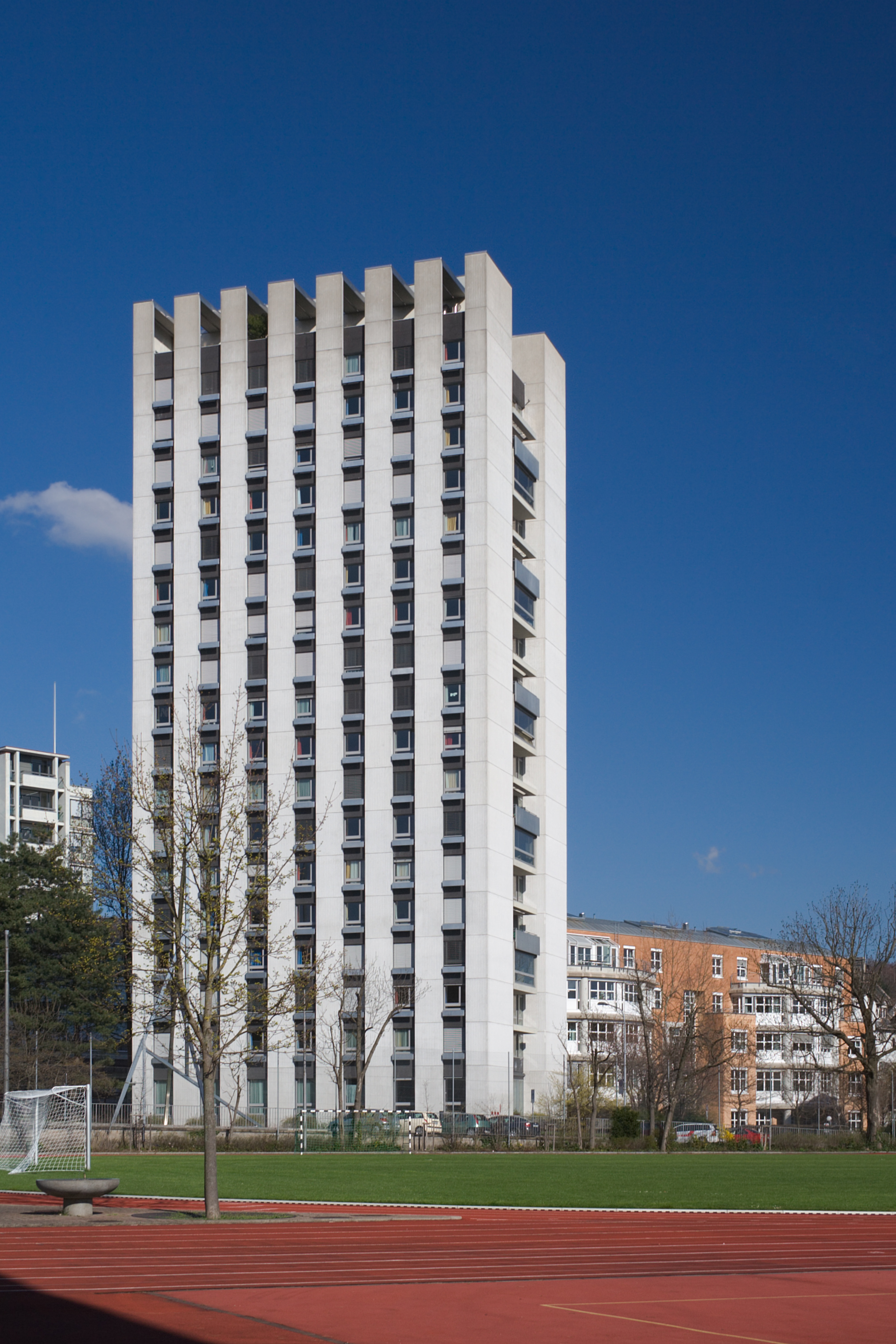 Schwesternhochhaus im Hochschulquartier, im Volksmund Schwesternsilo genannt. Beherbergt Personal vom nahe gelegenen Universitätsspital.Architekten Jakob Zweifel und Heinrich Strickler